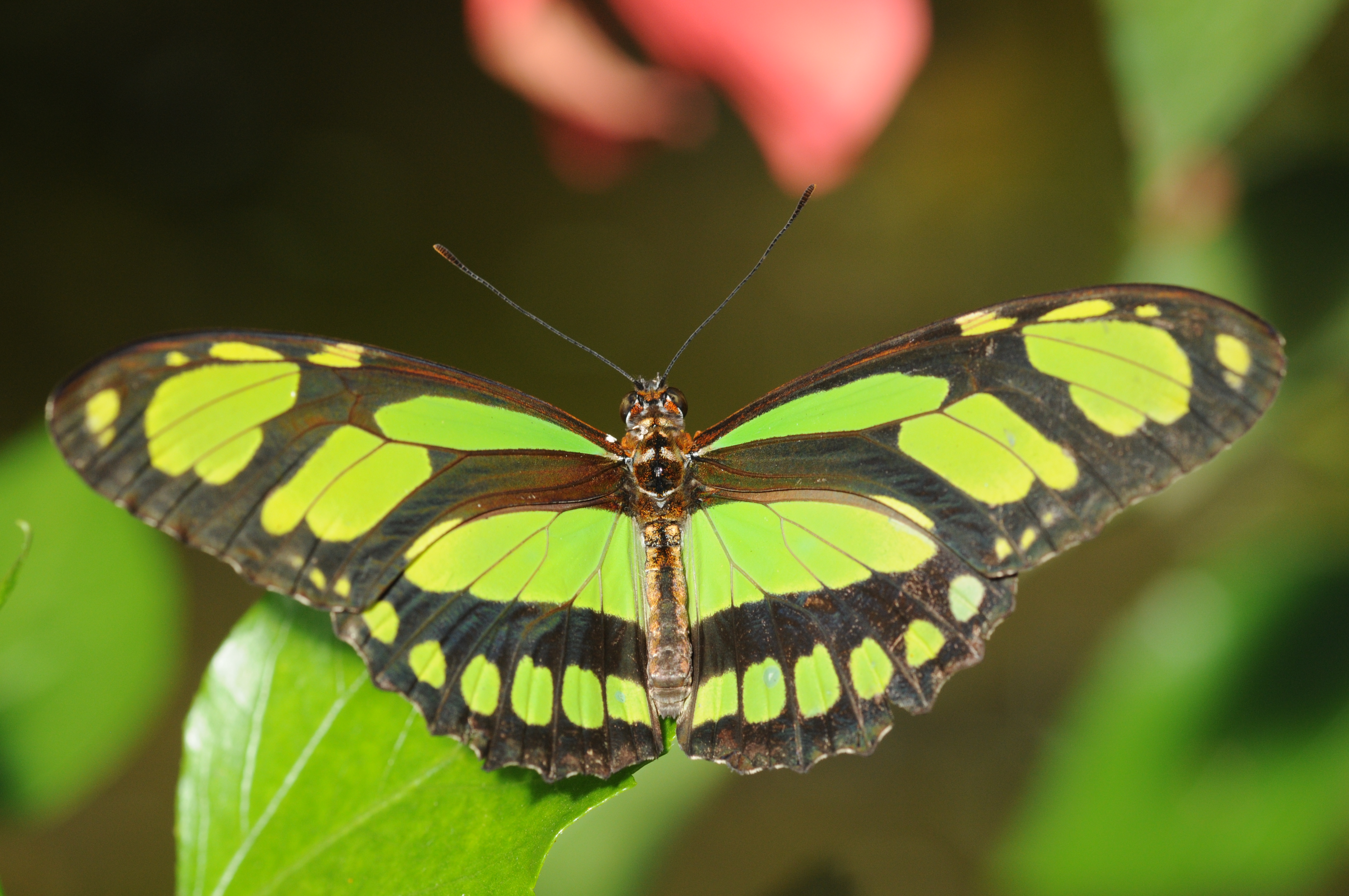 Lépidoptère